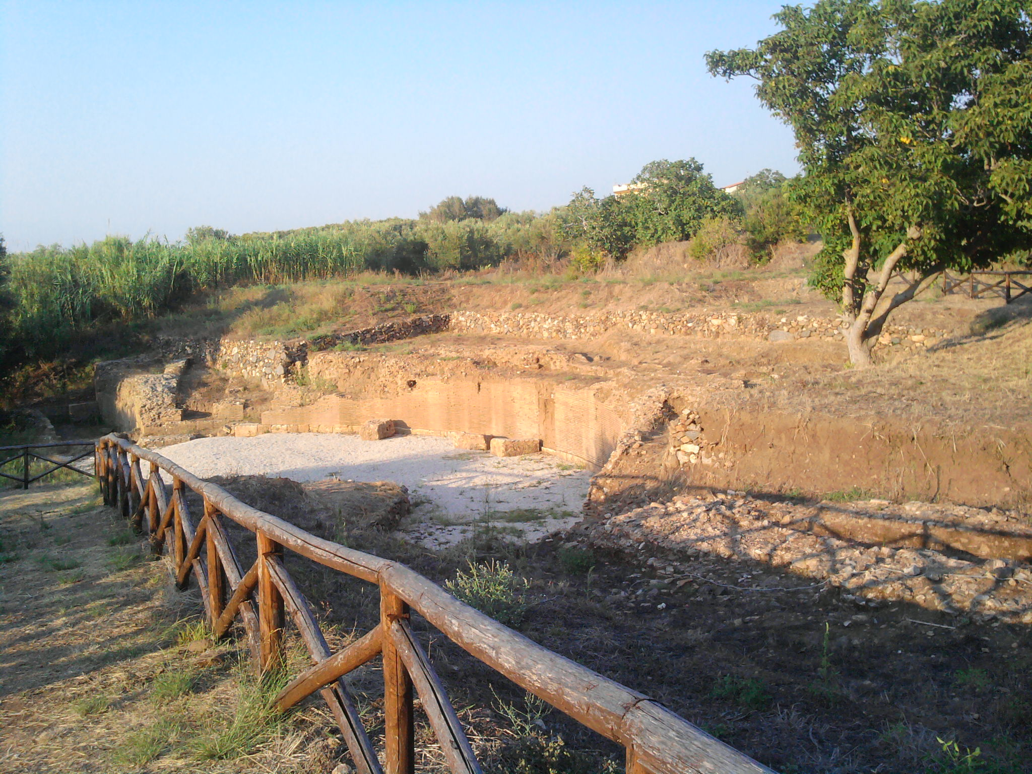 Anfiteatro romano collocato all'interno del Parco Archeologico dei Tauriani di Palmi